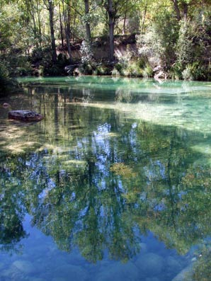 Desde Molina de Aragón salen numerosas rutas senderistas al Parque Natural del Alto Tajo